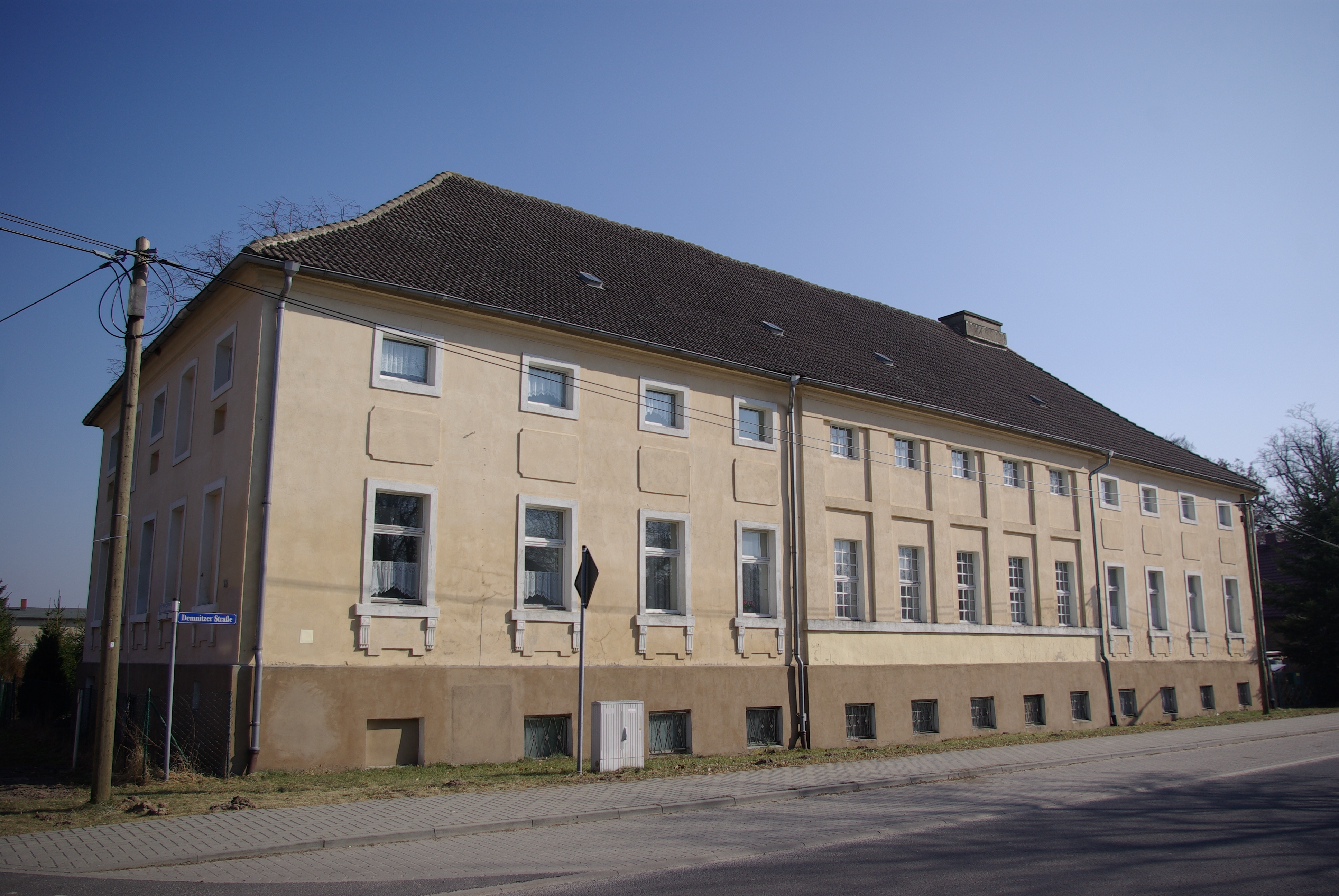 Steinhöfel in Brandenburg. Das Haus in der Demnitzer Straße 16 steht unter Denkmalschutz.